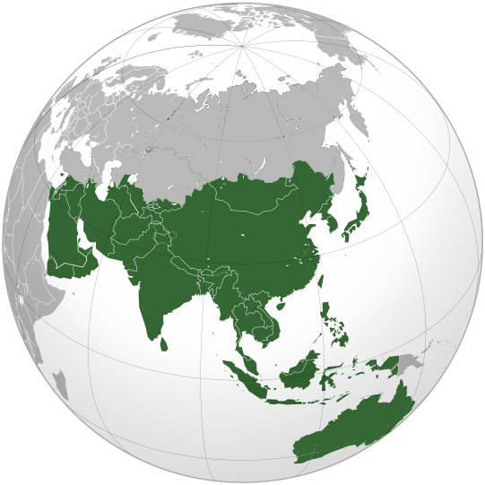 AFC orthographic projection Mapa AFC Mapa Asia